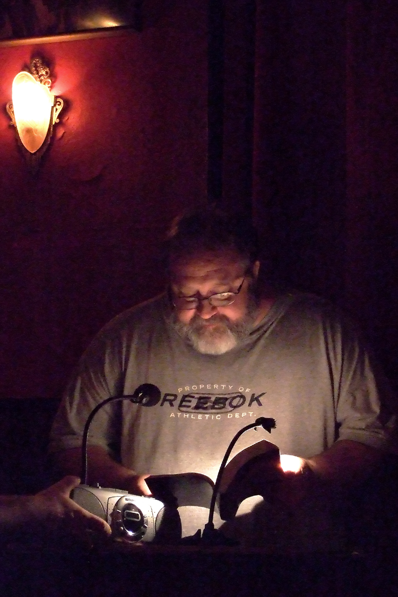 Jeffrey Ford KGB Salon Fantastique 2006-10-18